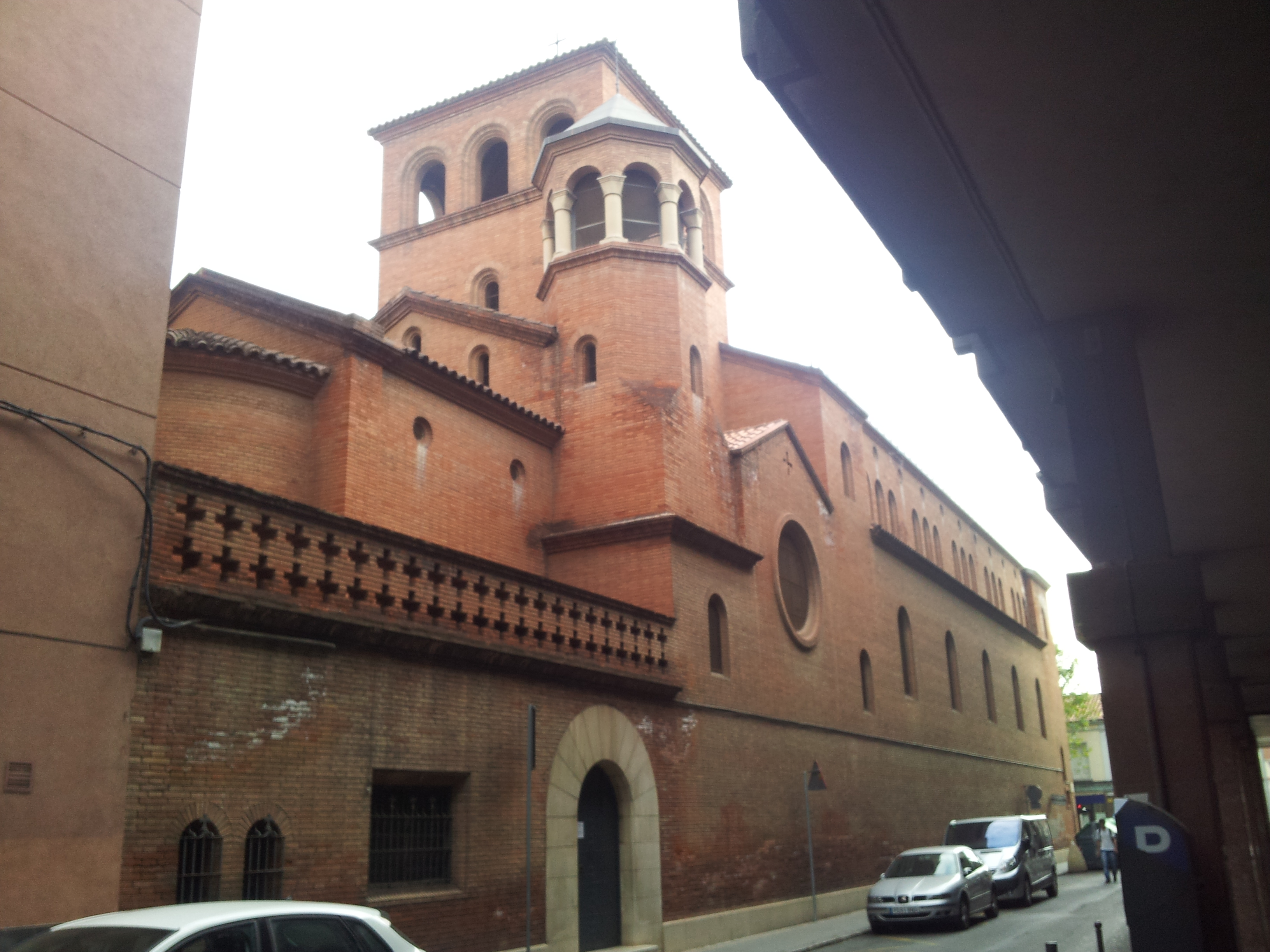 Sabadell